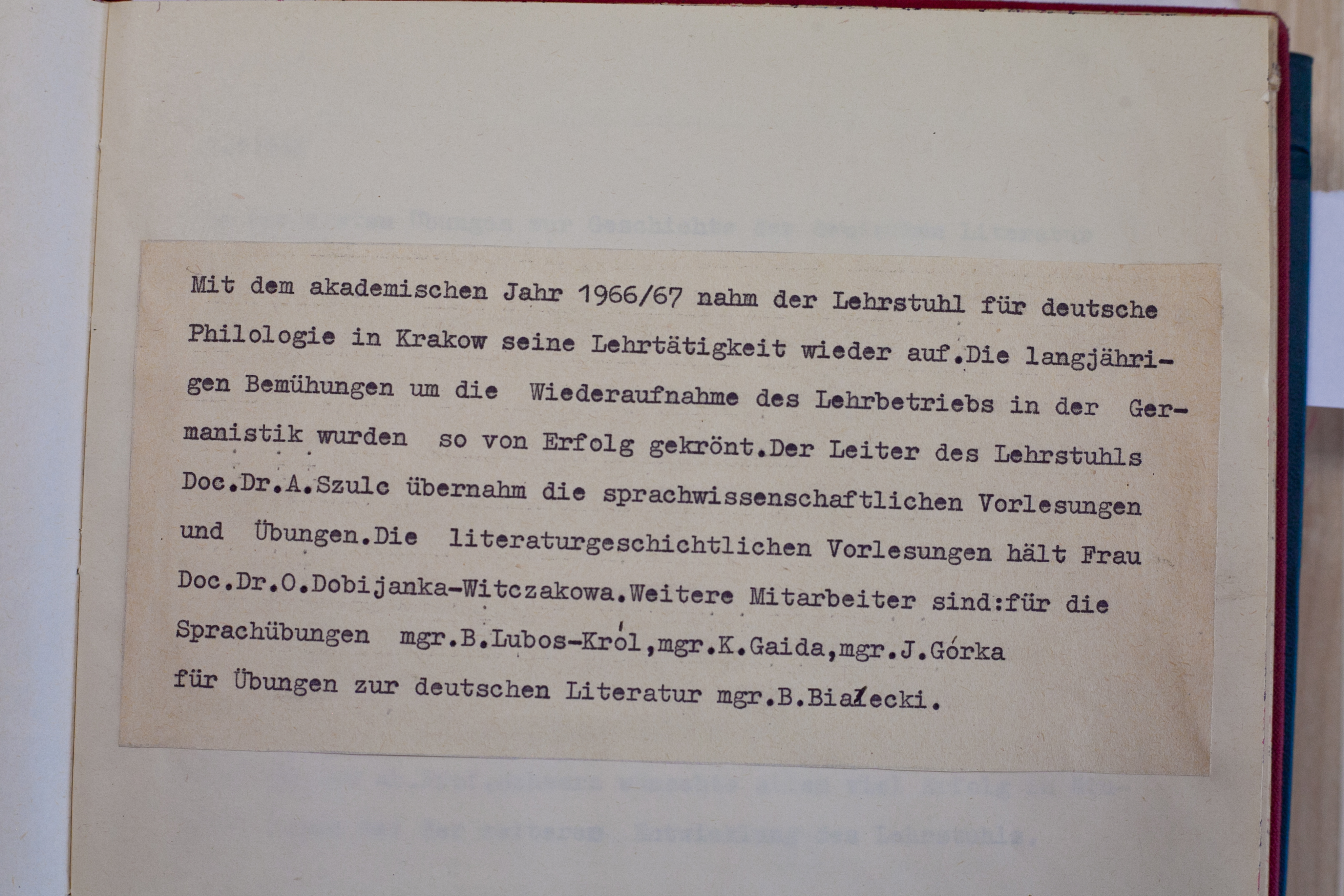 Pierwszy wpis w kronice ówczesnej Katedry Filologii Niemieckiej UJ, październik 1966